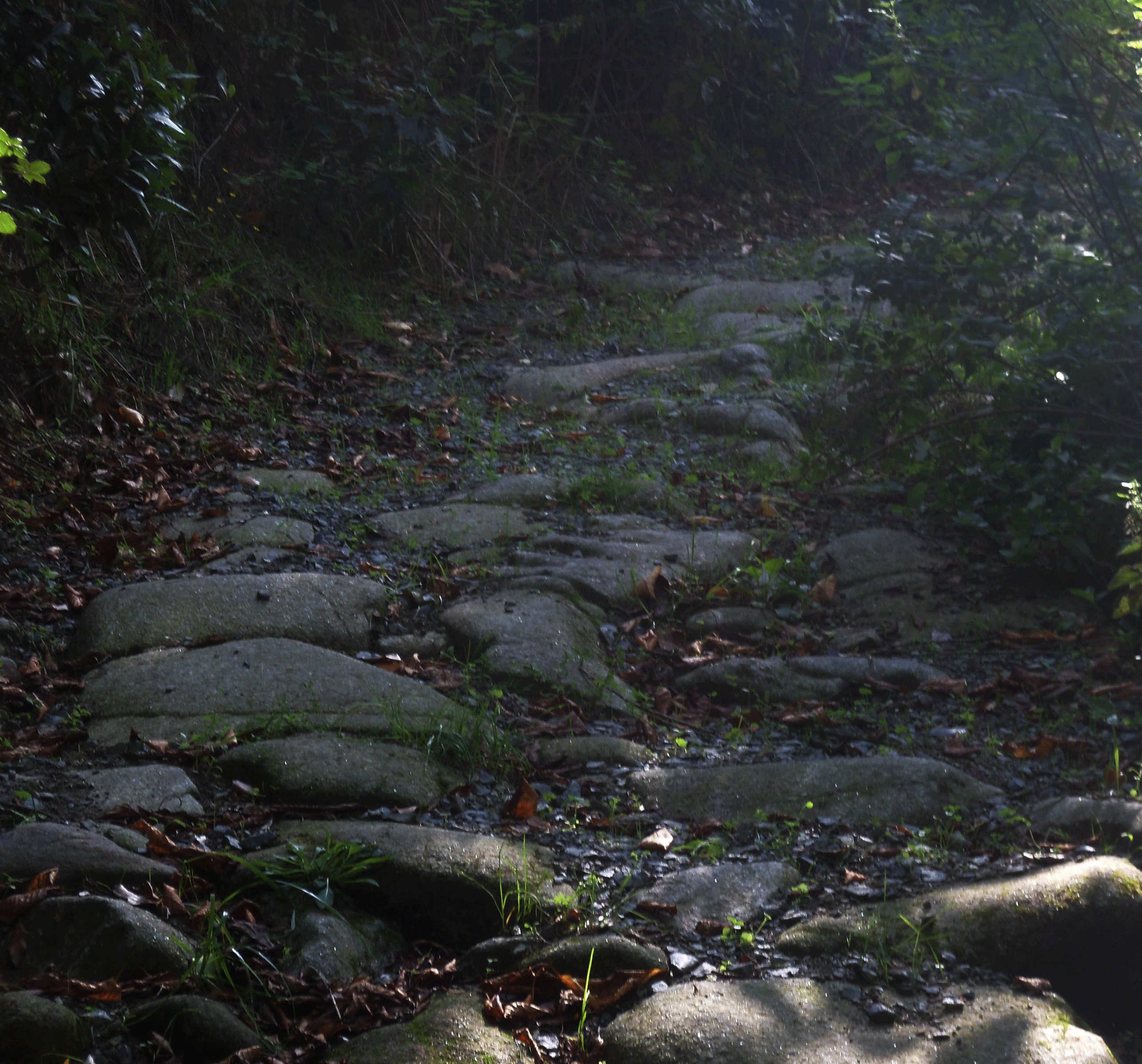 Calzada Romana en Ervixe